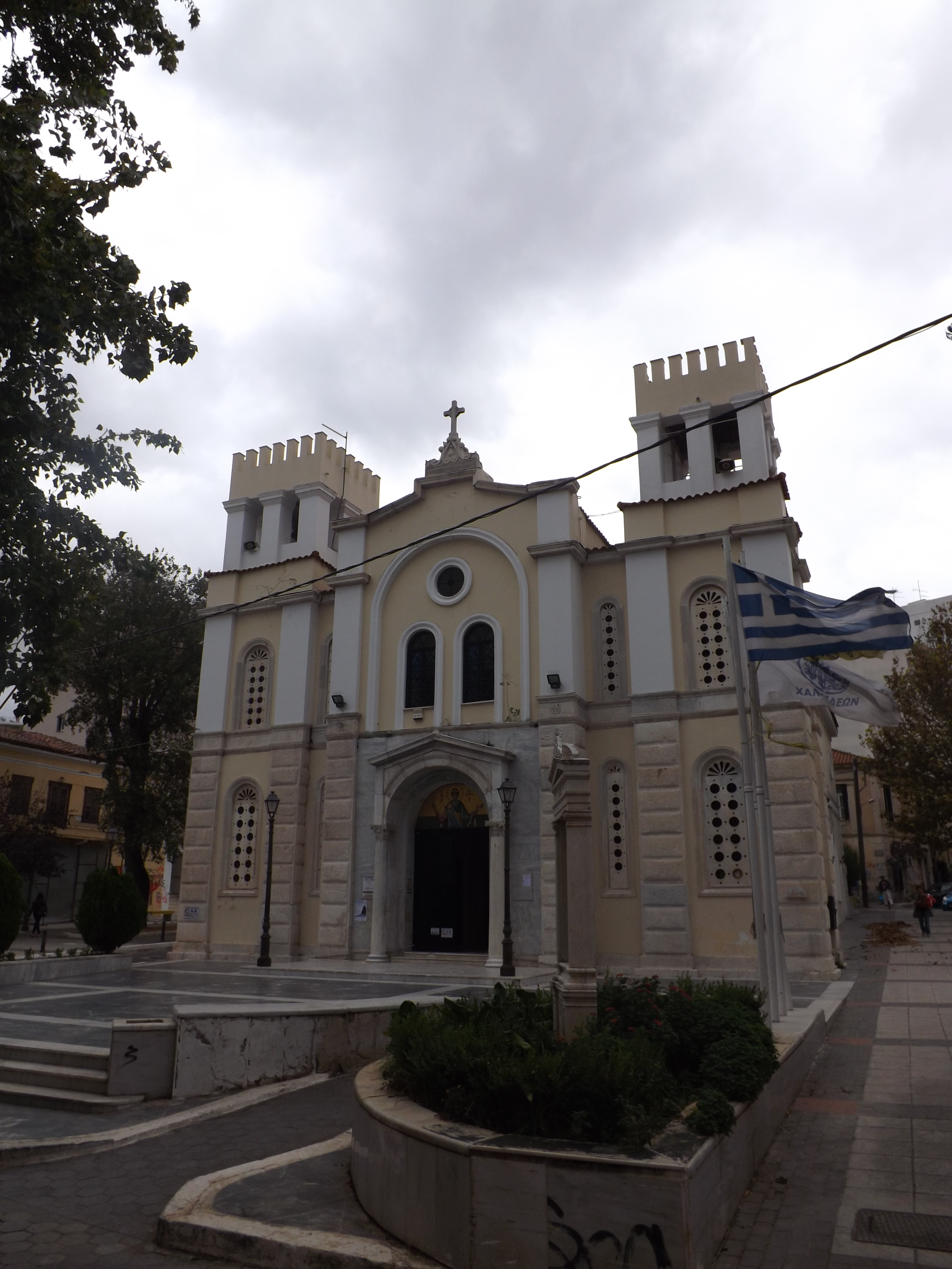 Μητροπολιτικός ναός Αγίου Δημητρίου Χαλκίδας«Μητροπολιτικός ναός Αγίου Δημητρίου Χαλκίδας»